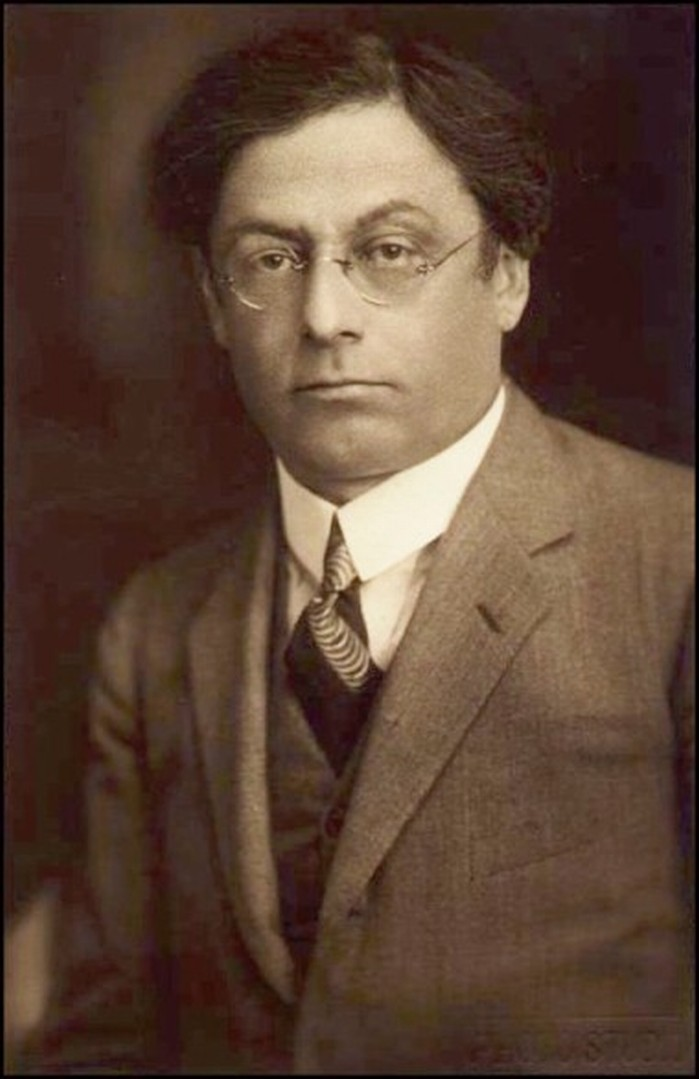 Leopold Procházka (1879 - 1944), Český spisovatel